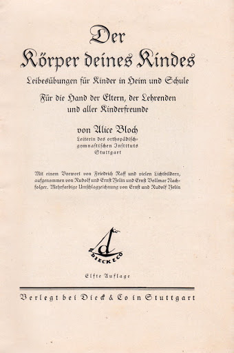 Alice Bloch Der Körper deines Kindes Titel